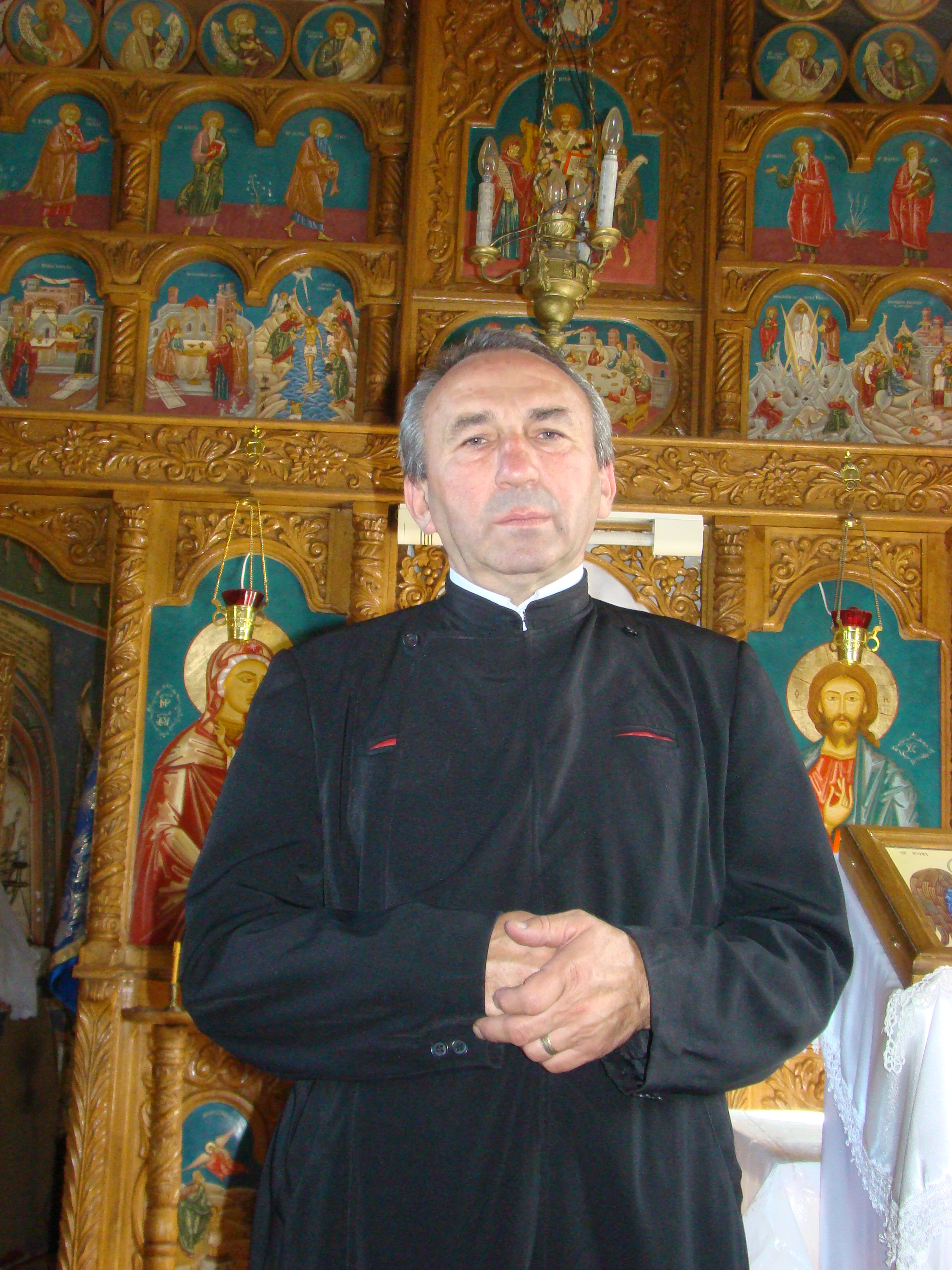 Biserica "Naşterea Sf. Ioan Botezătorul"-Din Grui